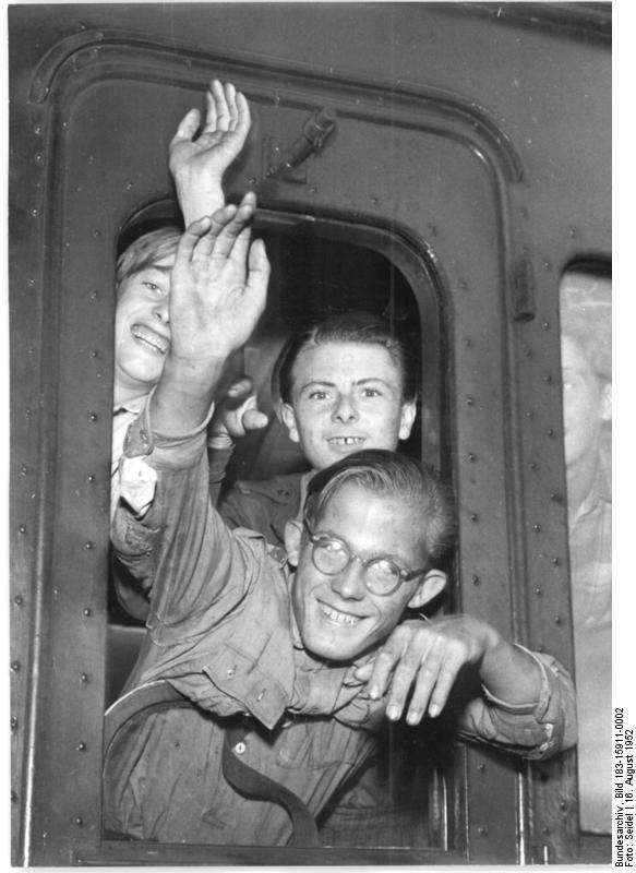 Zentralbild Seidel Me-Ho. 16.8.1952 Bereit zum "Dienst für Deutschland." 47 Jugendliche aus Chemnitz, die sich begeistert zum "Dienst für Deutschland" gemeldet haben, um aktiv am Aufbau des Sozialismus mitzuwirken, fuhren am 6.8.52 nach Pasewalk in das erste Lager der Organisation "Dienst für Deutschland". UBz: Fröhlicher Abschied der jugendlichen Erbauer des Sozialismus auf dem Chemnitzer Hauptbahnhof."